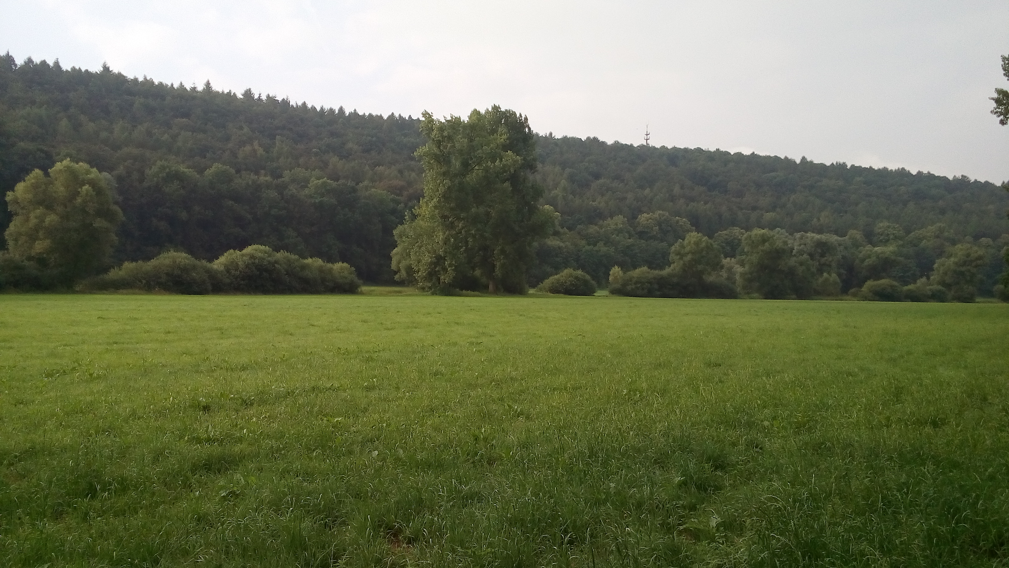 Schwarzbachaue